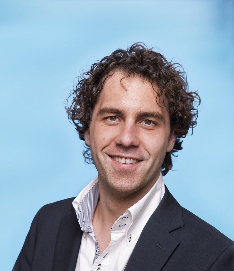 Martijn van Dam, Tweede Kamerlid. Foto: Lex Draijer.